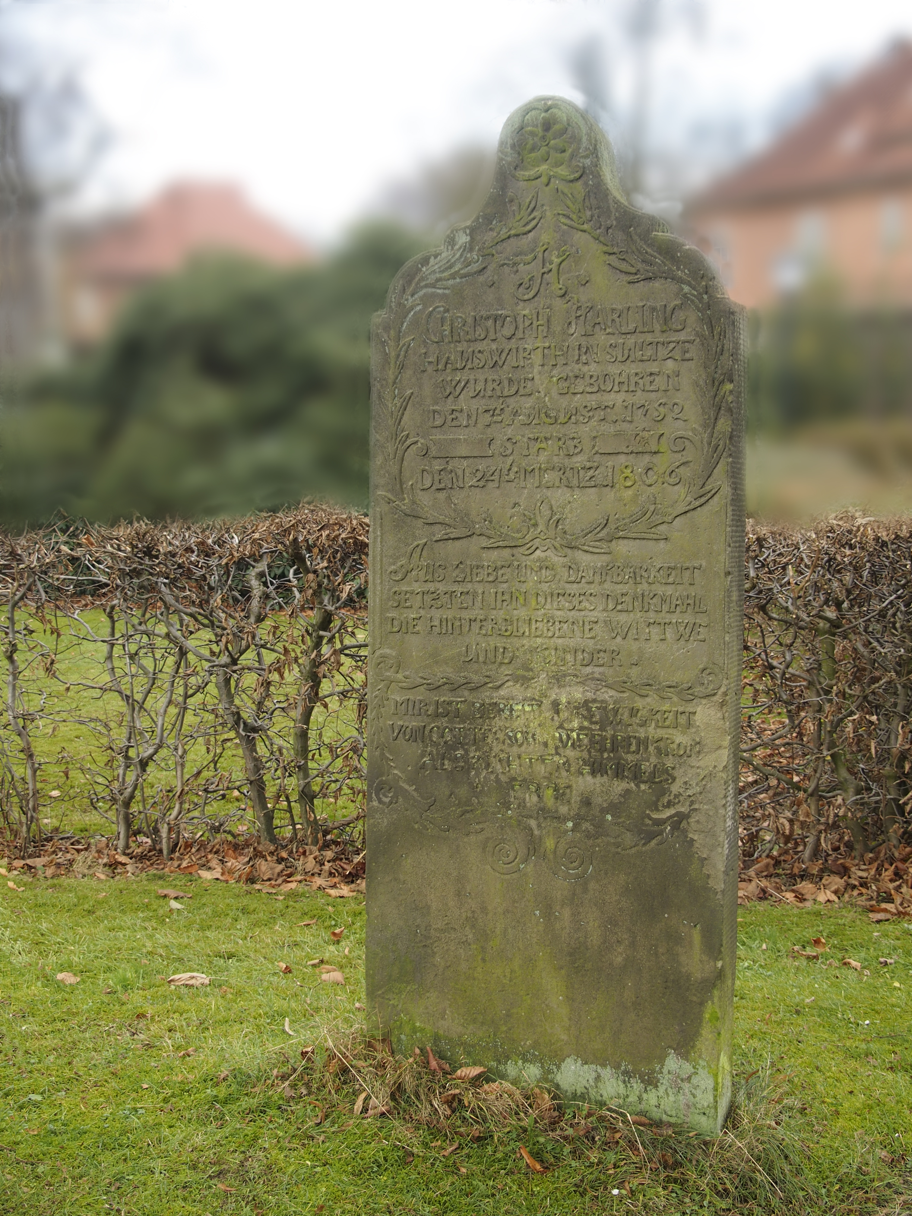 Grabstein von 1806 an der Fabian-und-Sebastian-Kirche Sülze (Bergen)